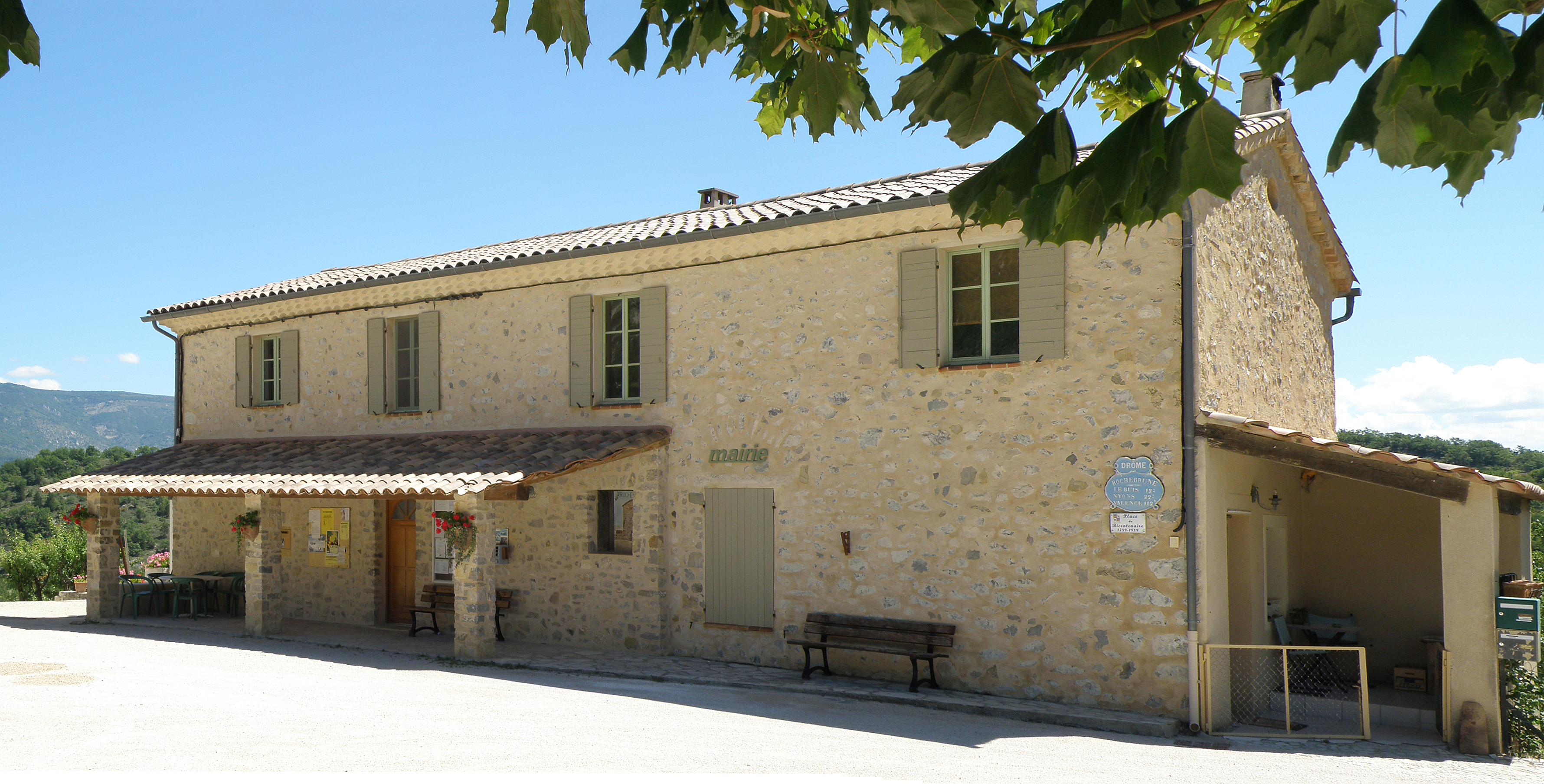 Rochebrune (Drôme). Mairie, sur la place du Bicentenaire.